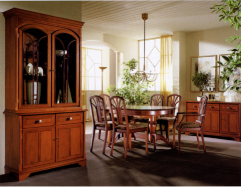 Wohnraummöbel „Jeunesse“ mit Jugendstilelementen, Französisch Nussbaum, 1980er Jahre / Möbelfabrik JOFI-KG, Steinheim/Westfalen